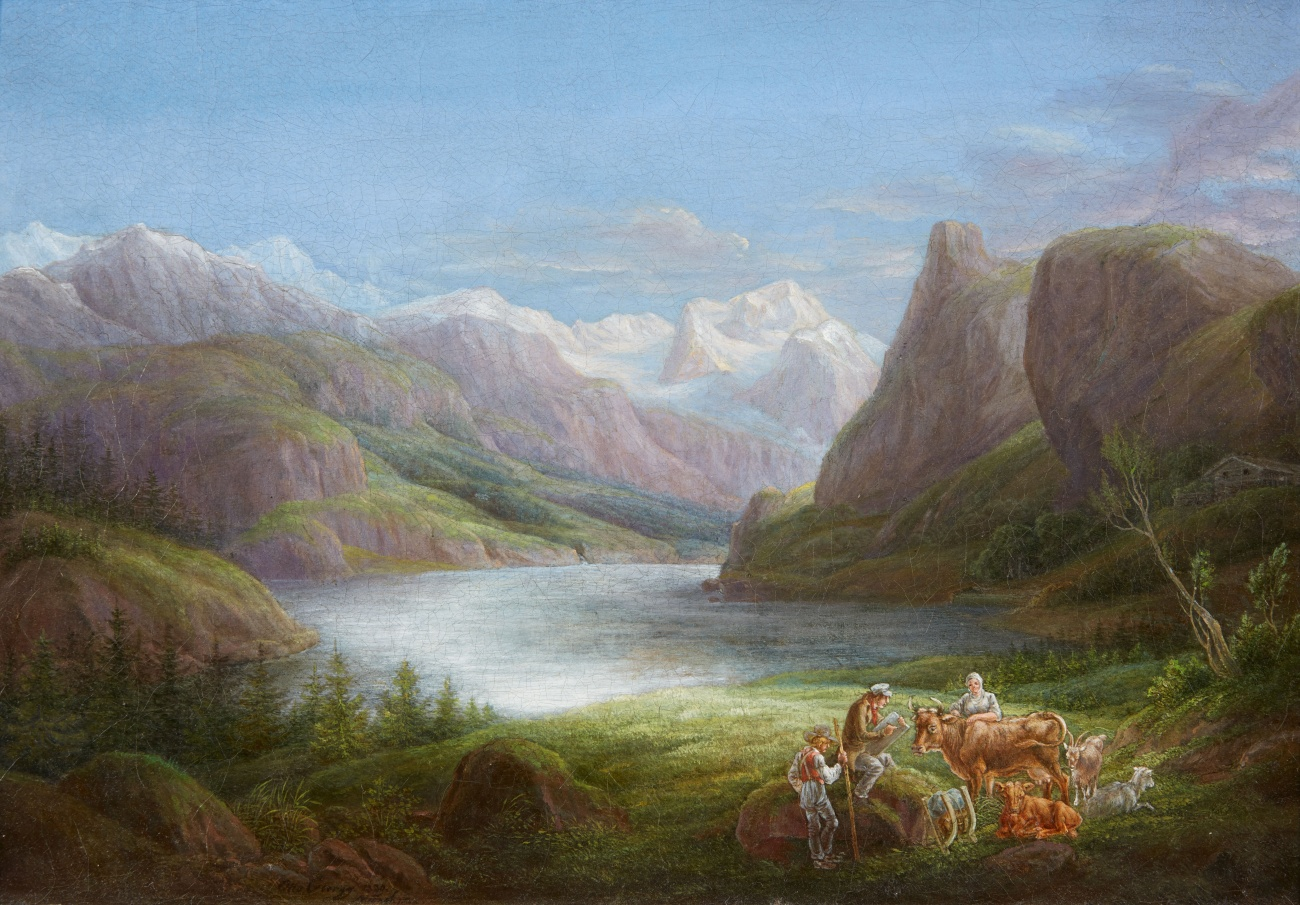 Gebirgssee mit zeichnendem Künstler und Hirtenstaffage. Öl auf Leinwand. 30 x 44 cm. Signiert und datiert unten links: Otto Georgy. 1839. München.